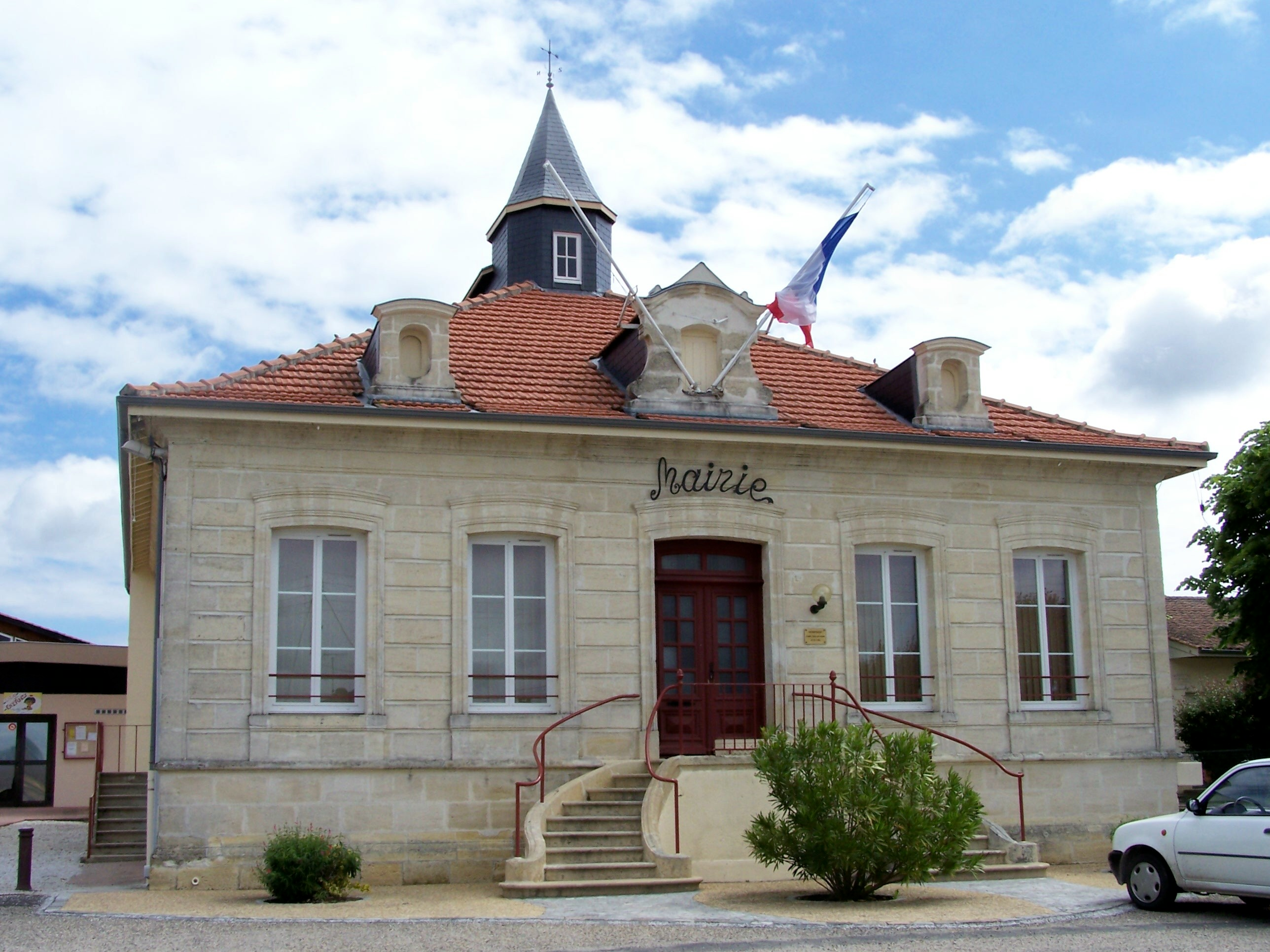 Mairie de Saint-Maixant, Gironde, France